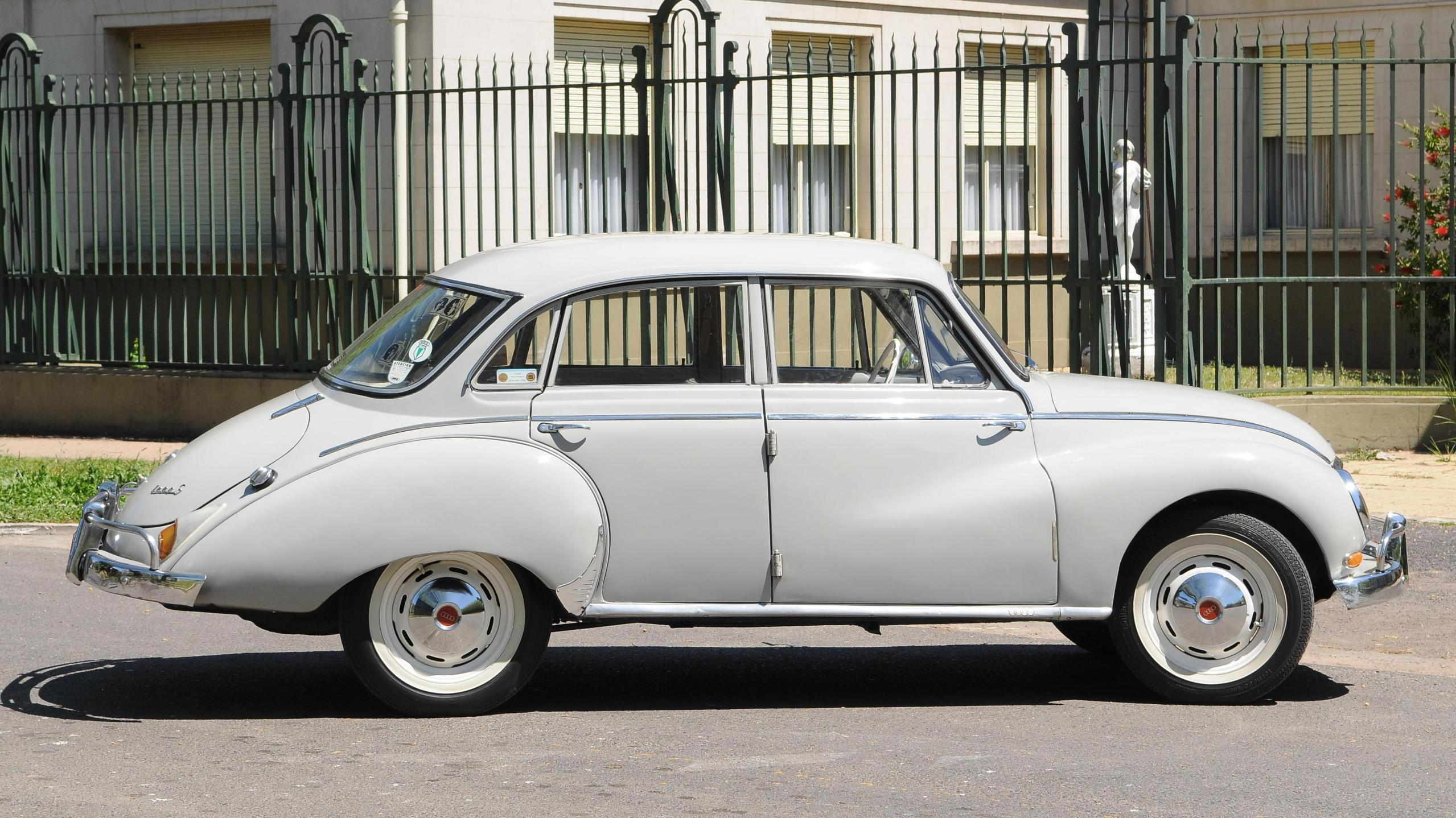 auto union cualidad imagen para wikipedia aporte auto union1965